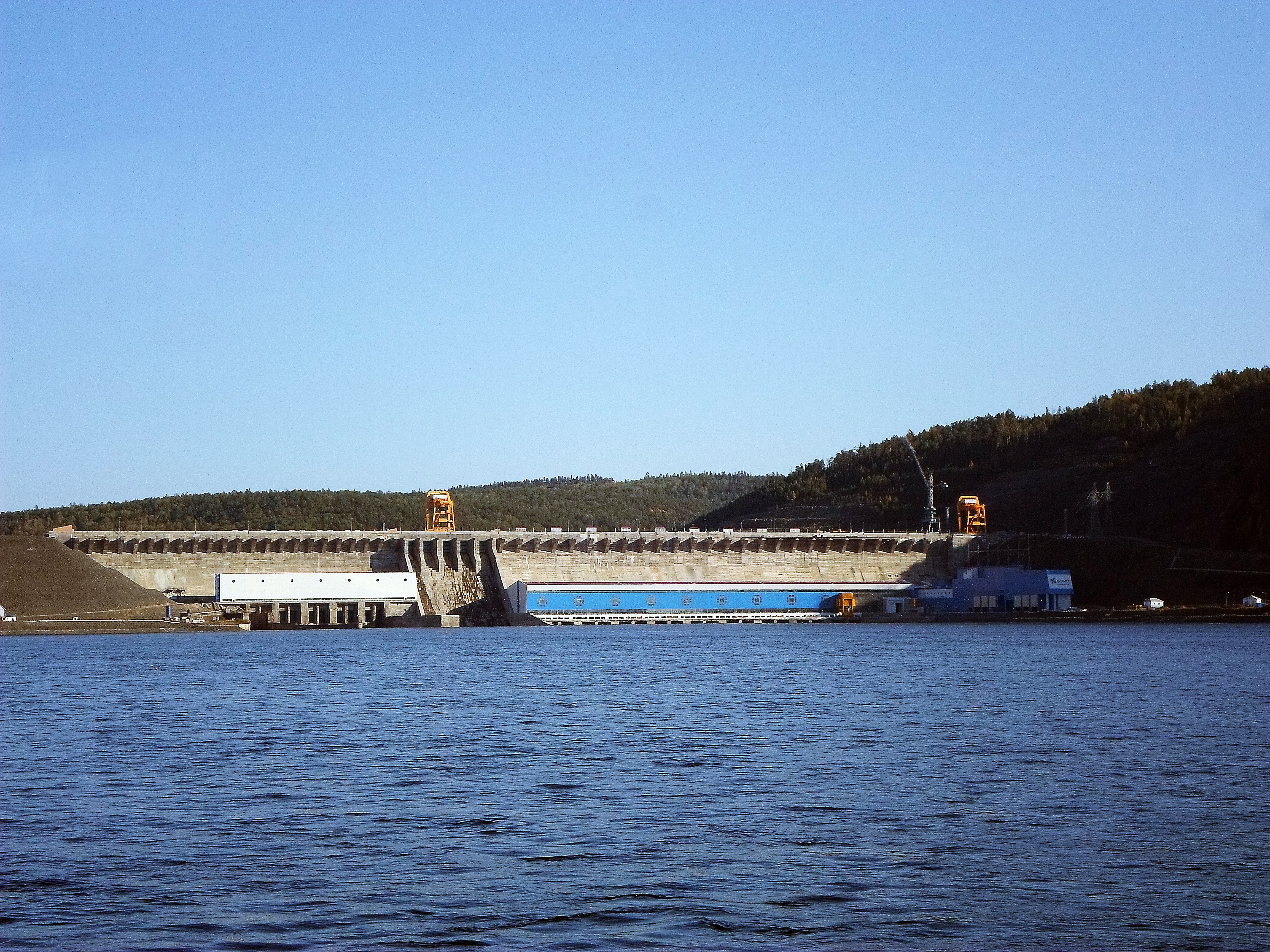 Плотина Богучанской ГЭС.